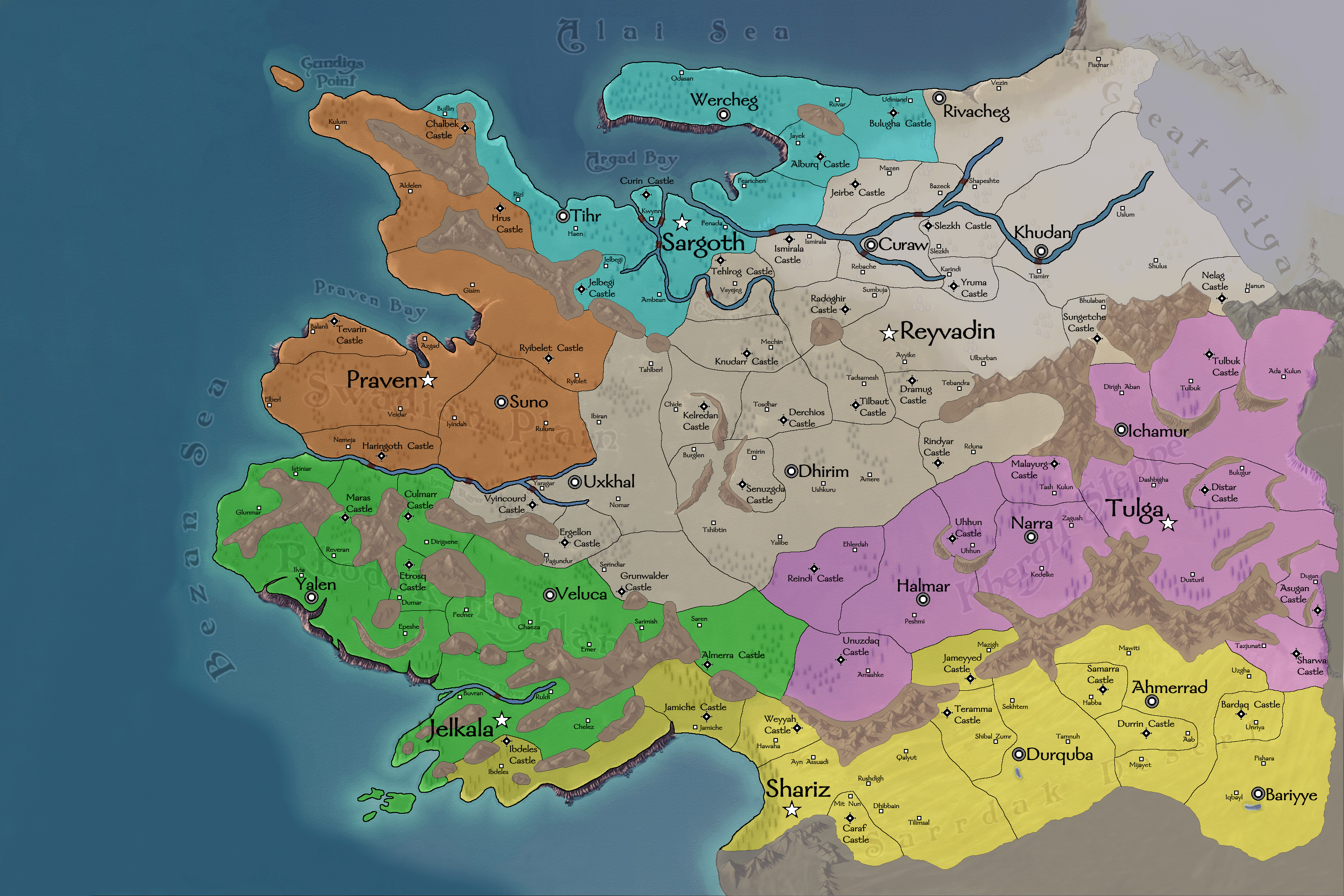 Mount & Blade: Warband'deki Kalradya haritası.